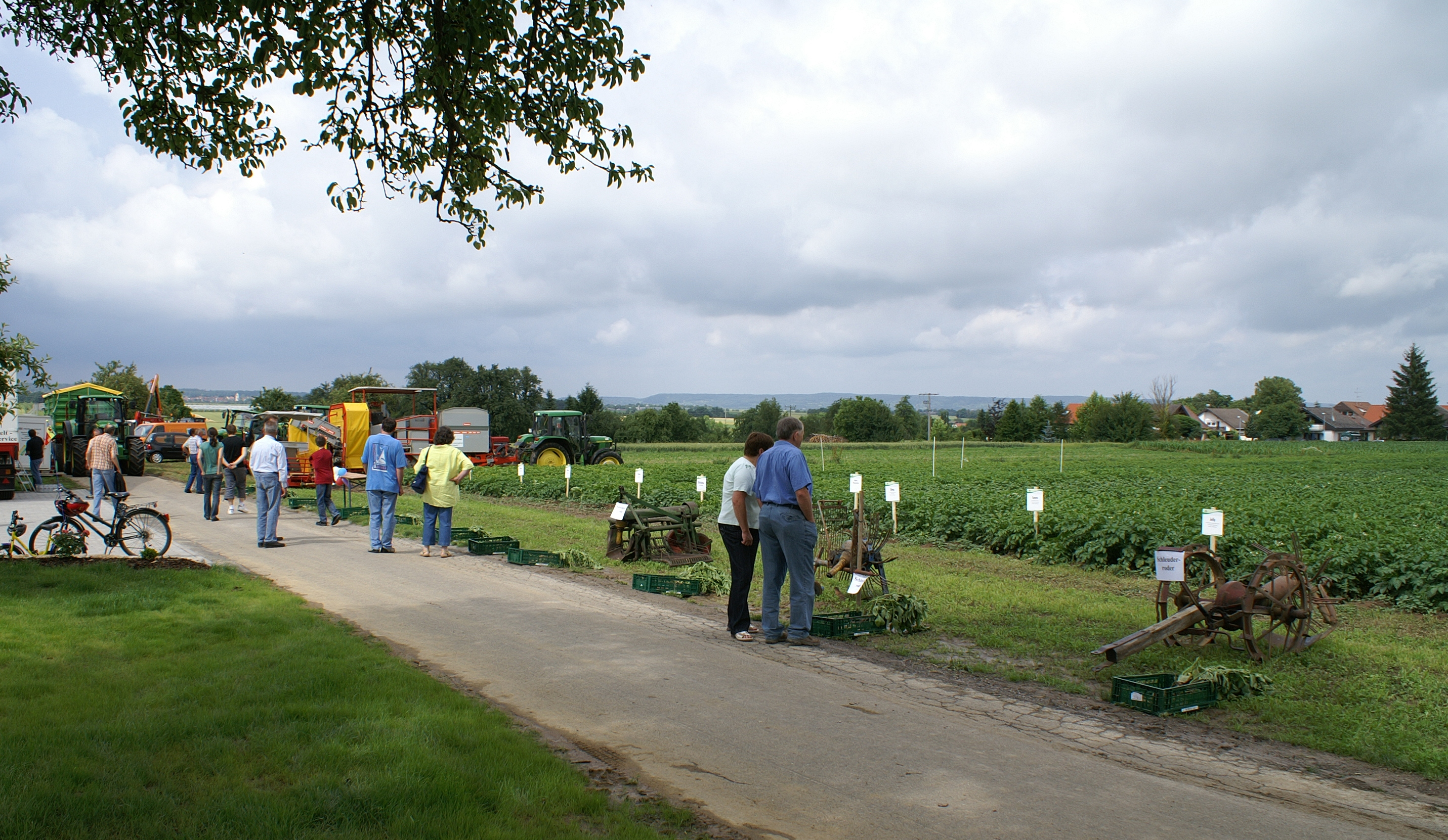 Bei der Gläsernen Produktion 2009 im Landkreis Böblingen war der Kartoffelanbau das zentrale Thema. Der Öffentlichkeit wurden zahlreiche verschiedene Kartoffelsorten und deren Verarbeitung sowie landwirtschaftliches Gerät vom historischen Kartoffelpflug für Pferdegespanne bis zum modernen Kartoffelvollernter gezeigt